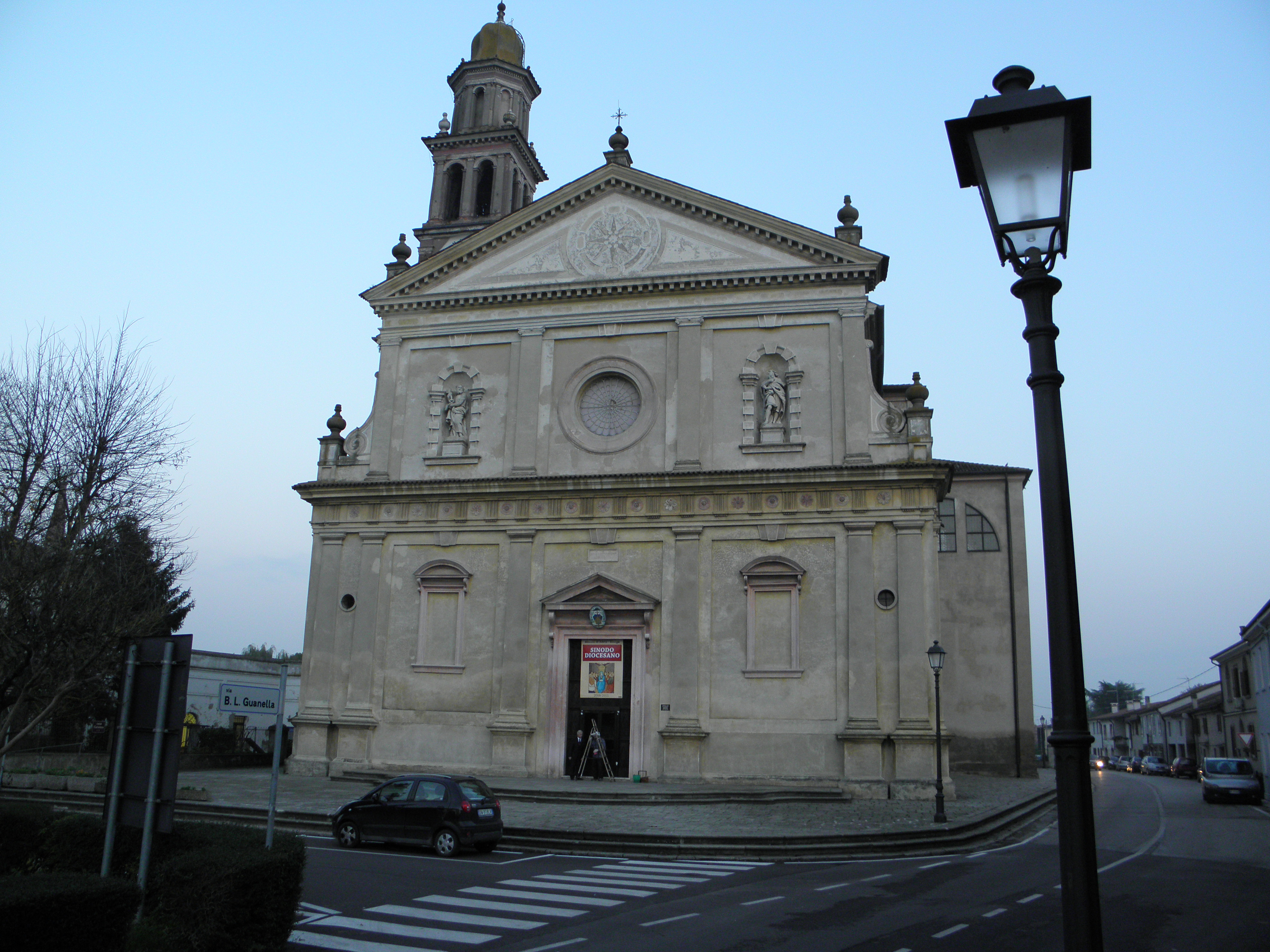 Chiesa parrocchiale dei Santi Pietro e Paolo apostoli a Fratta Polesine.